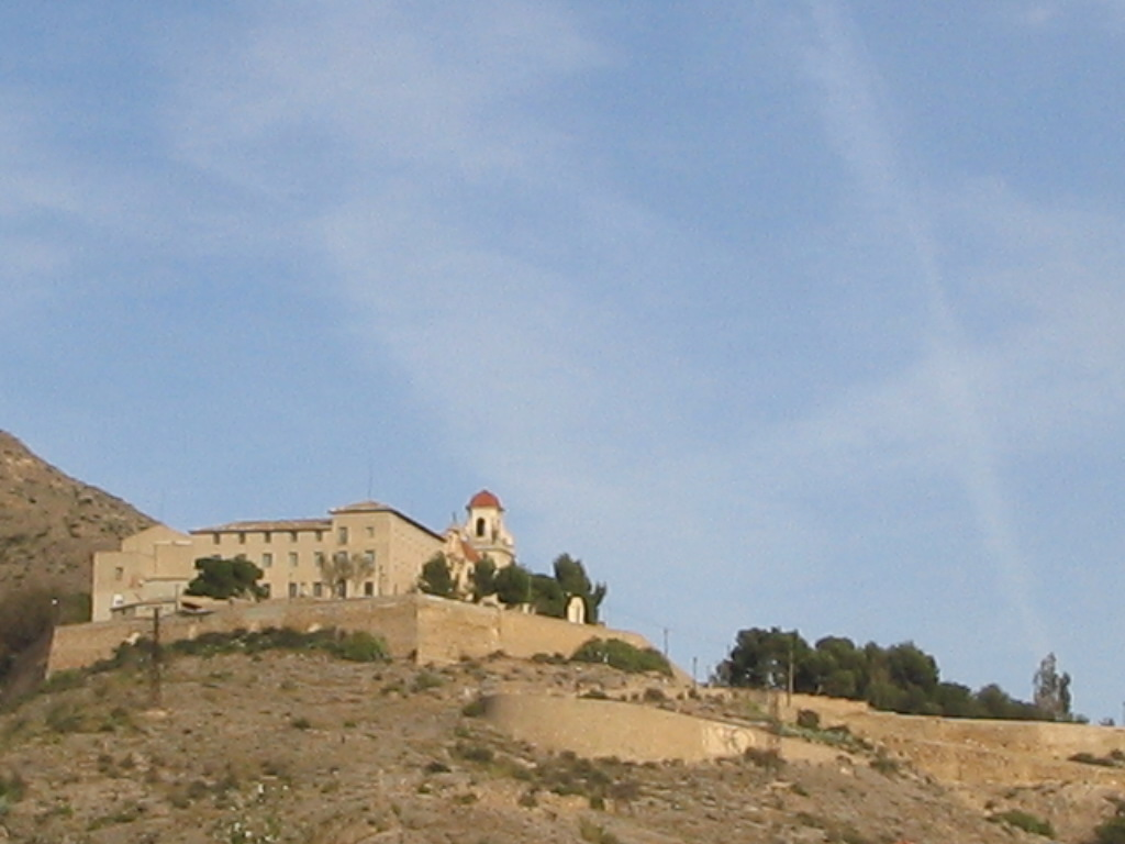 Seminari d'Oriola, C. Valenciana, Espanya.